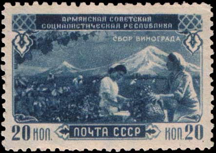 Почтовая марка СССР. 30-летие Армянской ССР. Сбор винограда, 1950.